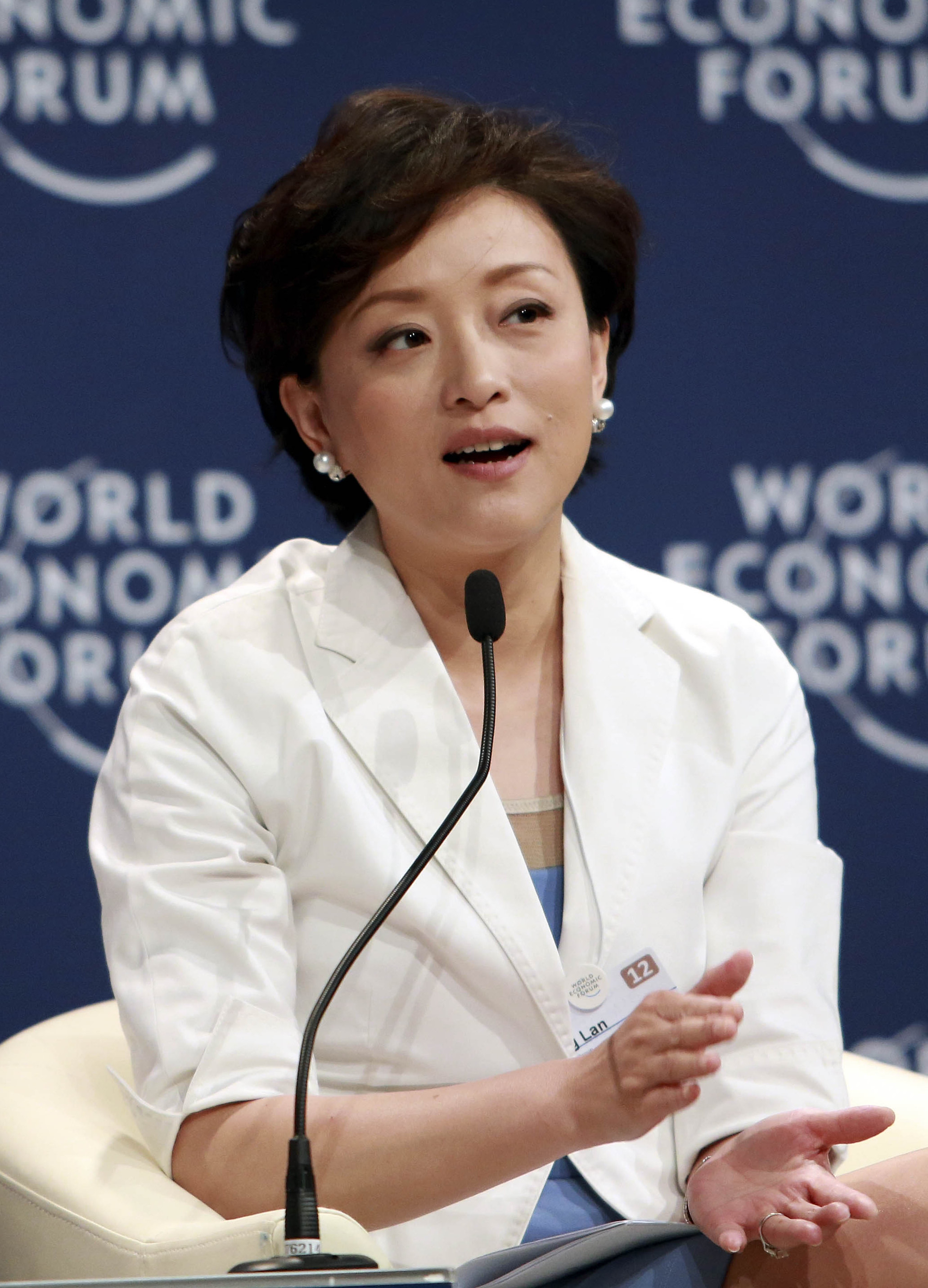 Yang Lan